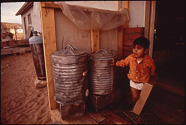 Navajo-Junge vor seinem Haus ohne fließendes Wasser, ohne Elektrizität und ohne Abfall-Abfuhrdienst, Mai 1972 ARC Identifier: 544372